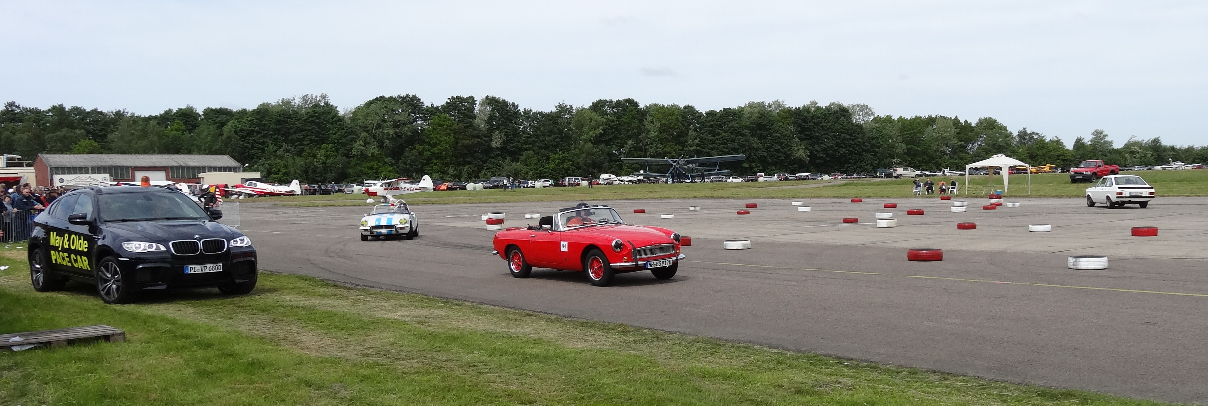 Motorsportveranstaltung auf dem Flughafen "Hungriger Wolf" im Juni 2013